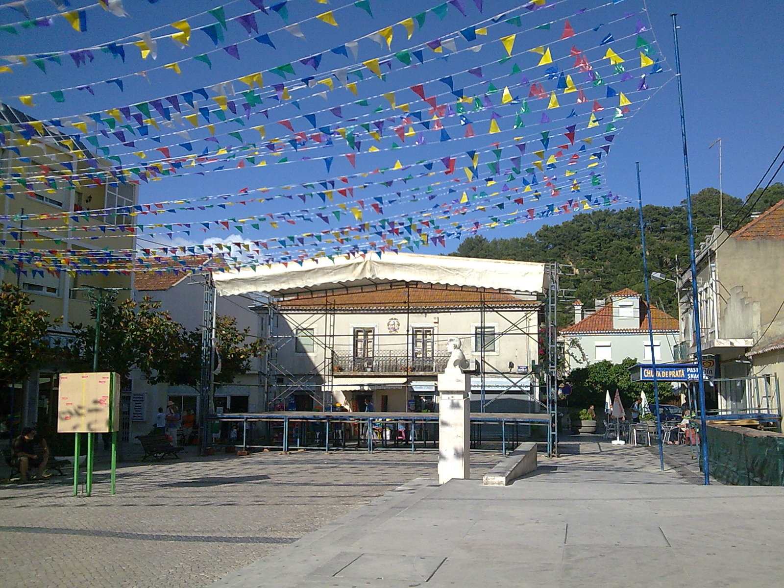 Palco Mundo das Festas de S.Pedro da Trafaria